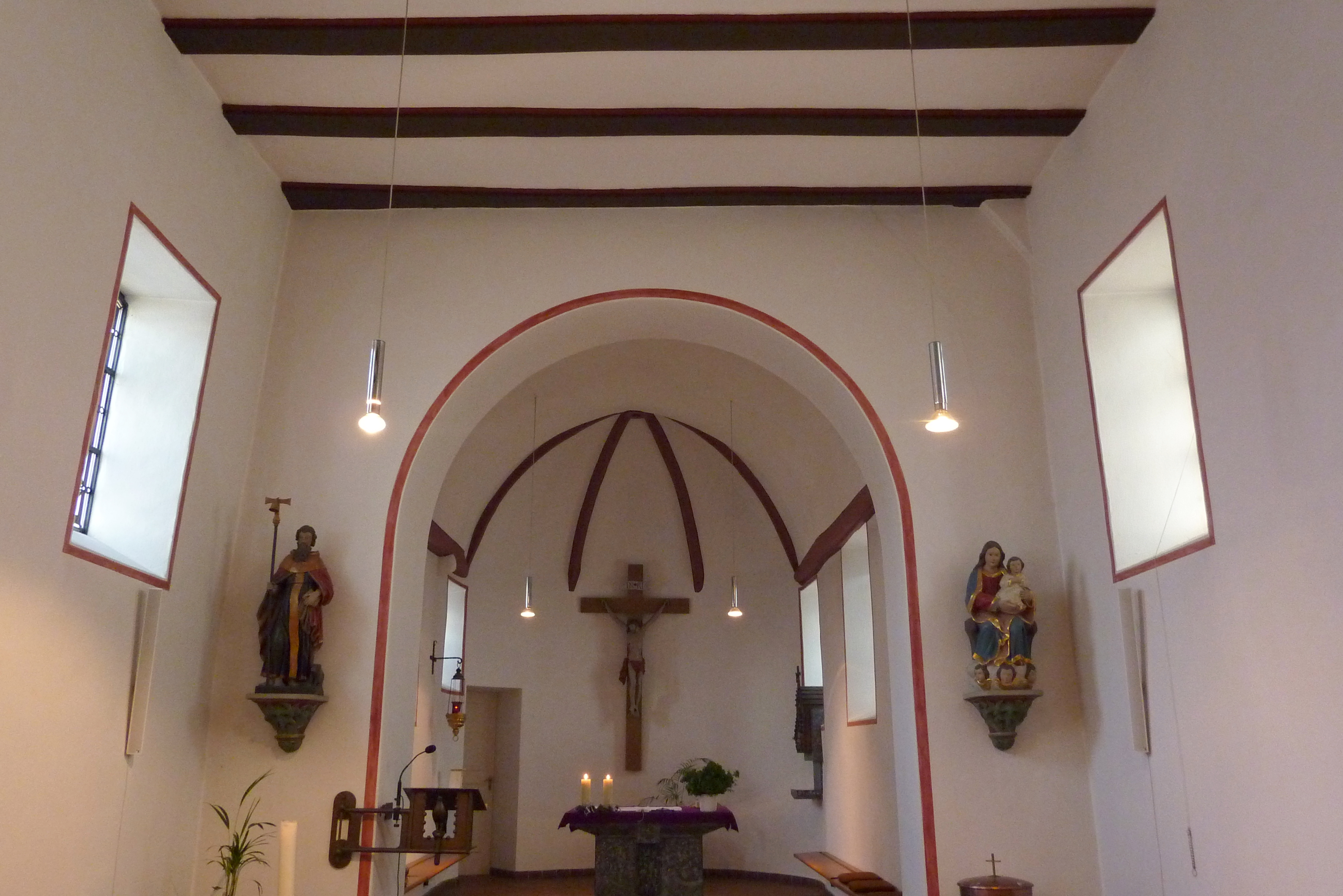 Katholische Pfarrkirche St. Antonius in Niederdrees, einem Stadtteil von Rheinbach